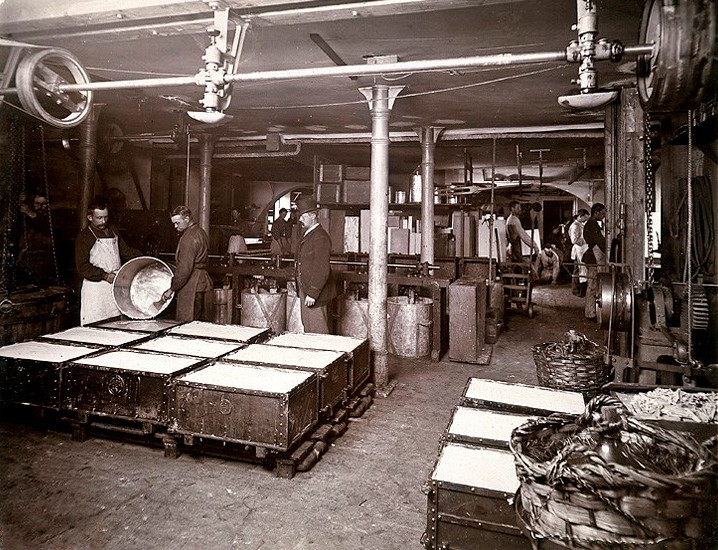 Foto av Axel Rydin från 1894 Stadsmuseet Fotonummer DIA 81 Stockholmskällan